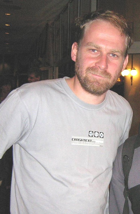 Marcin Perchuć (ur. 30 czerwca 1973 roku w Warszawie) – polski aktor telewizyjny, dubbingowy, filmowy i teatralny.